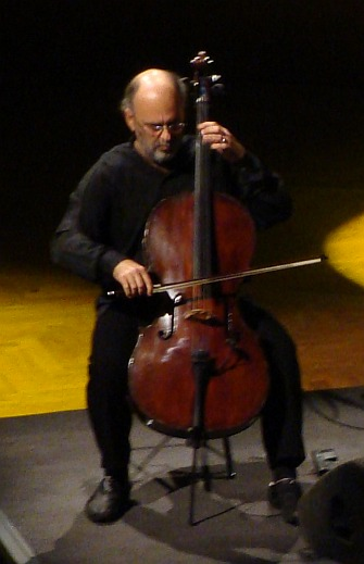 Jacques Morelenbaum in concert with Gilberto Gil, Palais des Beaux-Arts [1], Bruxelles, Belgique, 11/2009, GILBERTO GIL - The String Concert, Gilberto Gil guitare, chant, compositeur - Jaques Morelembaum violoncelle - Bem Gil guitare, percussions. Un an après son départ du gouvernement Lula, Gilberto Gil se consacre à nouveau entièrement à ce qui, au fond, dirige toute son existence : sa carrière de chanteur le plus populaire du Brésil. En tournée européenne, le roi de la bossa nova s’entoure de son fils Bem à la guitare et au pandeiro, mais aussi, et pour la première fois, du très convoité violoncelliste Jaques Morelenbaum, célèbre arrangeur de Caetano Veloso.»